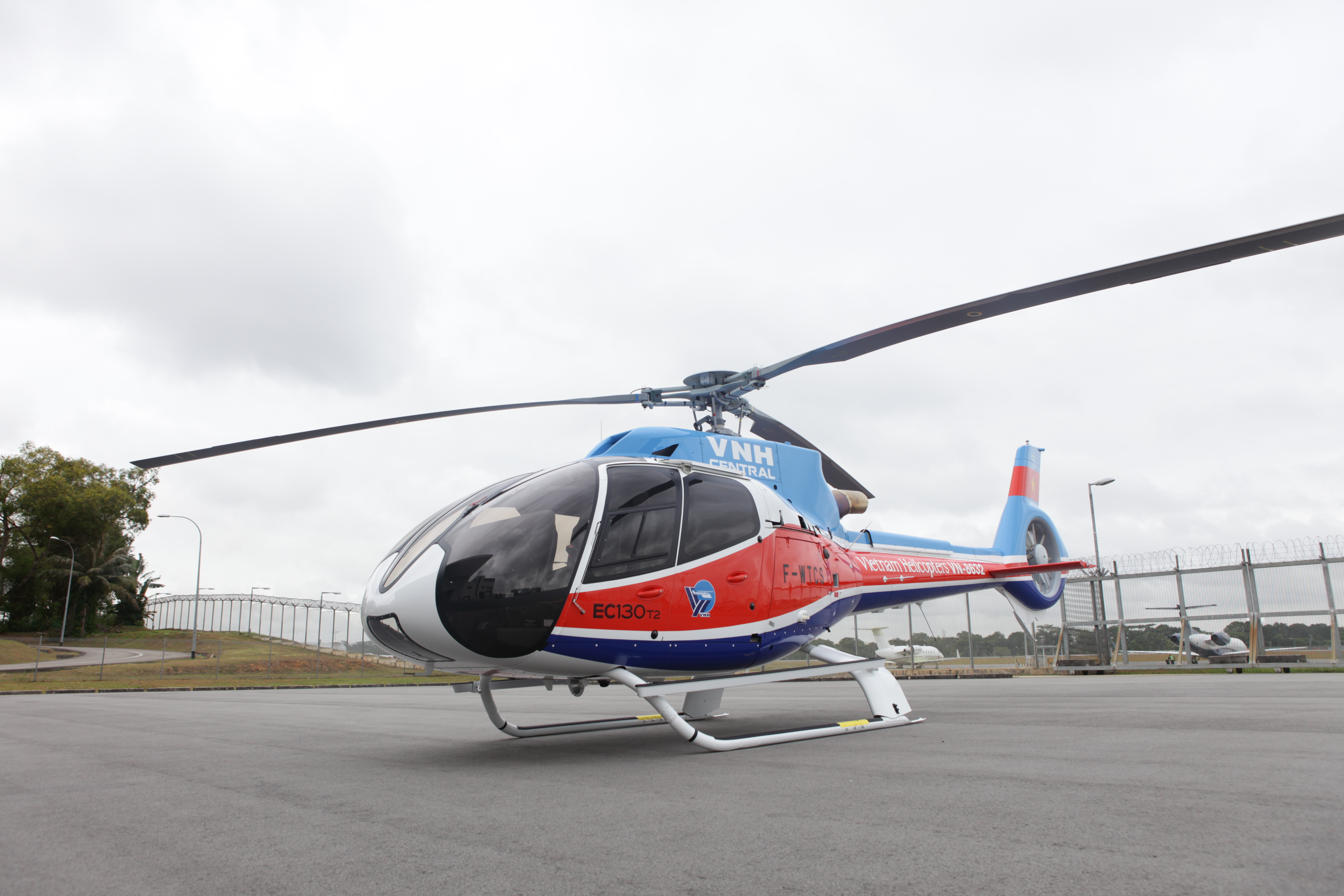 Trực thăng EC130T2 của VNH chuyên dùng cho hoạt động bay du lịch, ngắm cảnh, vận chuyển VIP